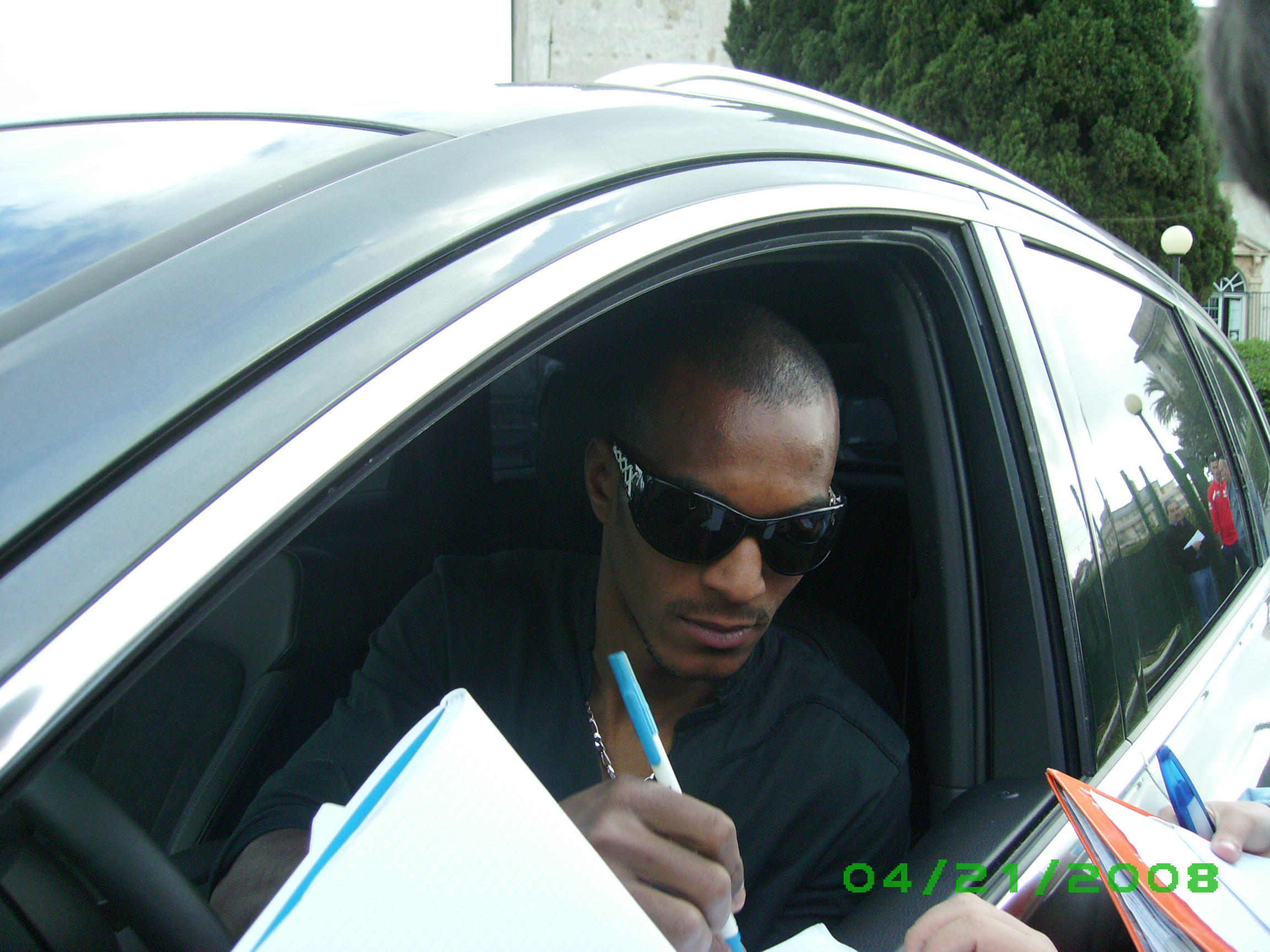 Abdoulay Konko